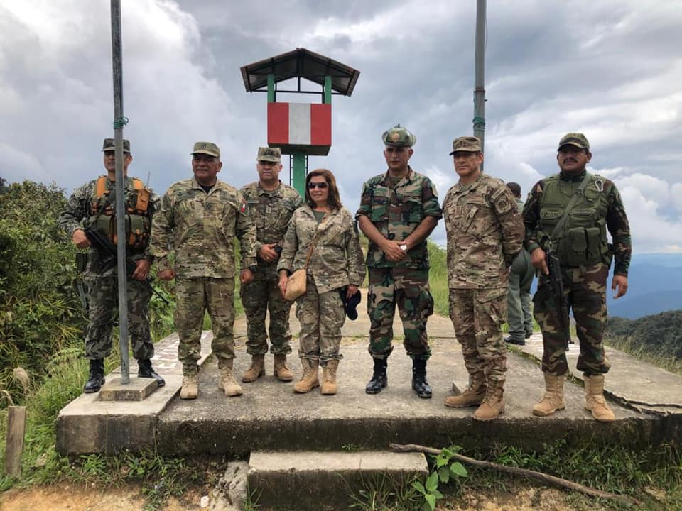 El Tambo CENEPA - Fuerzas Especiales César Astudillo Cesar Astudillo Jefe del Comando Conjunto CCFFAA Fuerzas Armadas